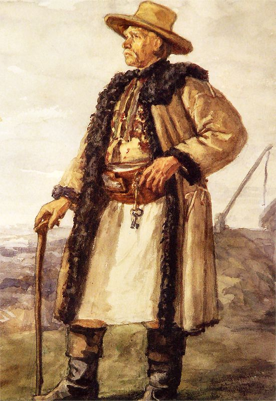 Палагичі — село Тлумацького району Івано-Франківської області. Війт Микола Wójt Nykoła Z cyklu Album Pałahickie. 1867. Akwarela na papierze. 23 x 32 cm. Muzeum Lubuskie w Gorzowie Wielkopolskim. Українець. Ukrainian